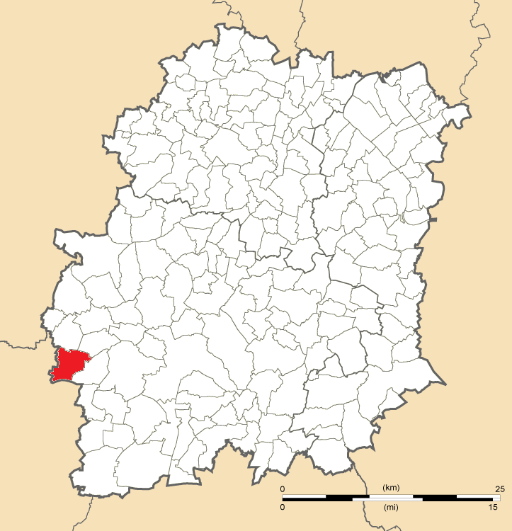 Carte de position de Saint-Escobille en Essonne (91)